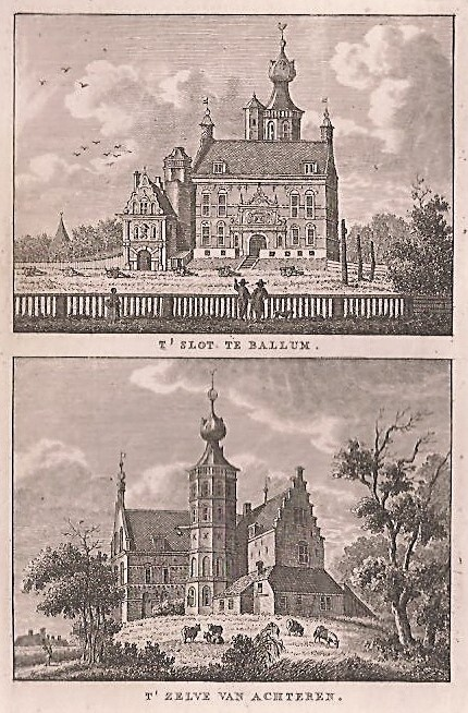 Camminghaslot te Ballum, Ameland